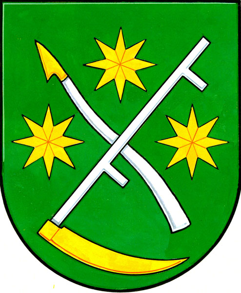 Česky: znak obce Újezd